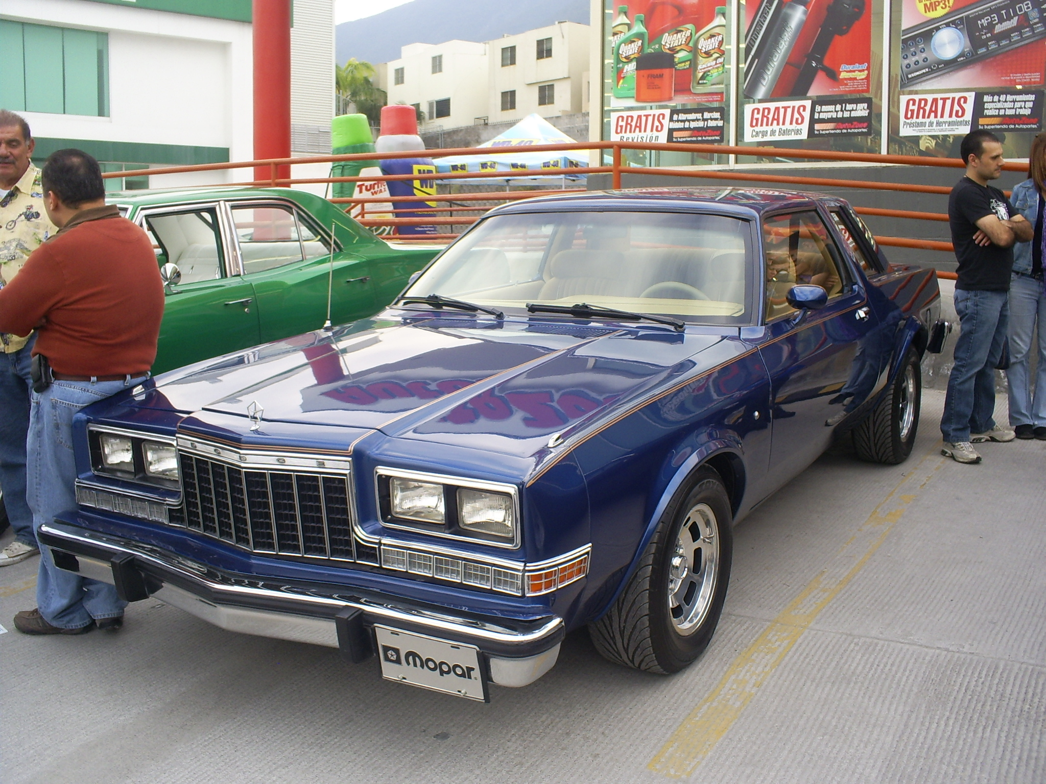 Mexican Dodge Magnum 1981 - 1982